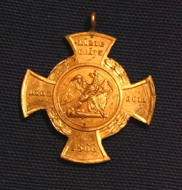 Erinnerungskreuz Königgrätz mit Inschrift: „GOTT WAR MIT UNS, IHM SEI DIE EHRE“ für das siegreiche preußische Heer 1866.